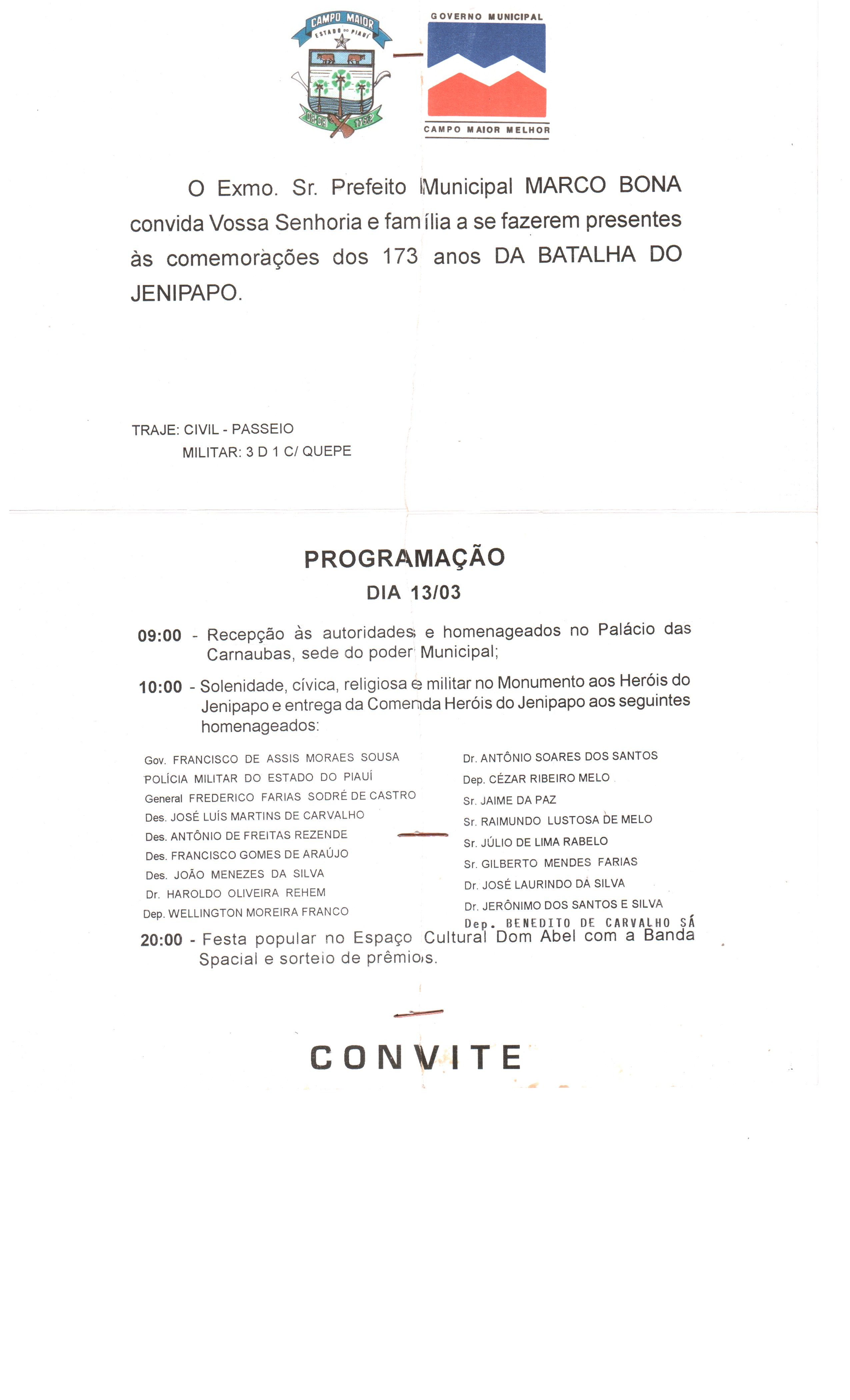 Convite paras as Comemorações Cívicas da Batalha do Jenipapo em 1996.